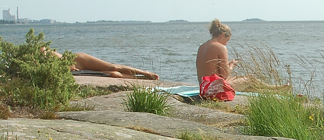 Skutbergets naturistbad Karlstad